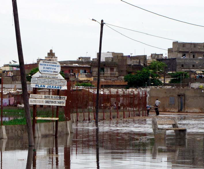 Photo inondation Pikine